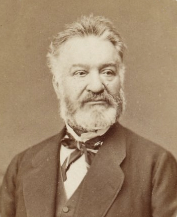 Portrait de Louis Veuillot vers 1870